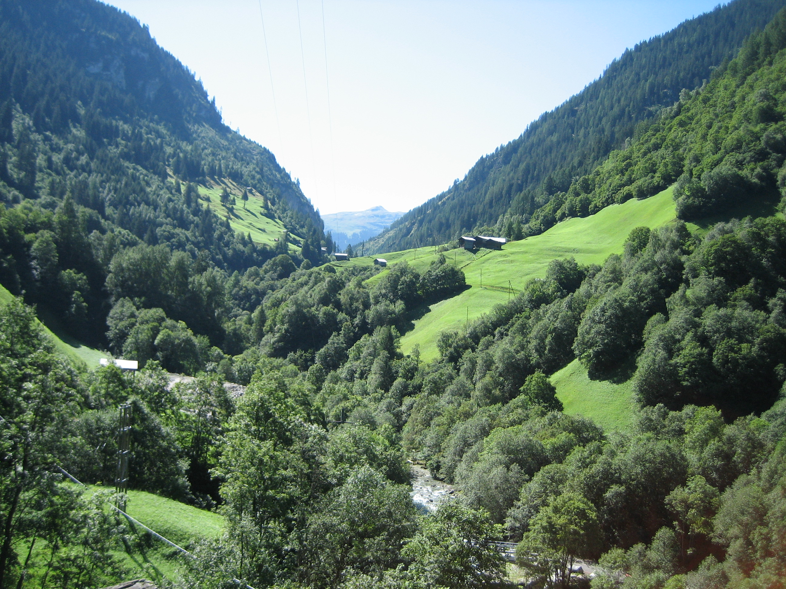 Valsertal Richtung Süden